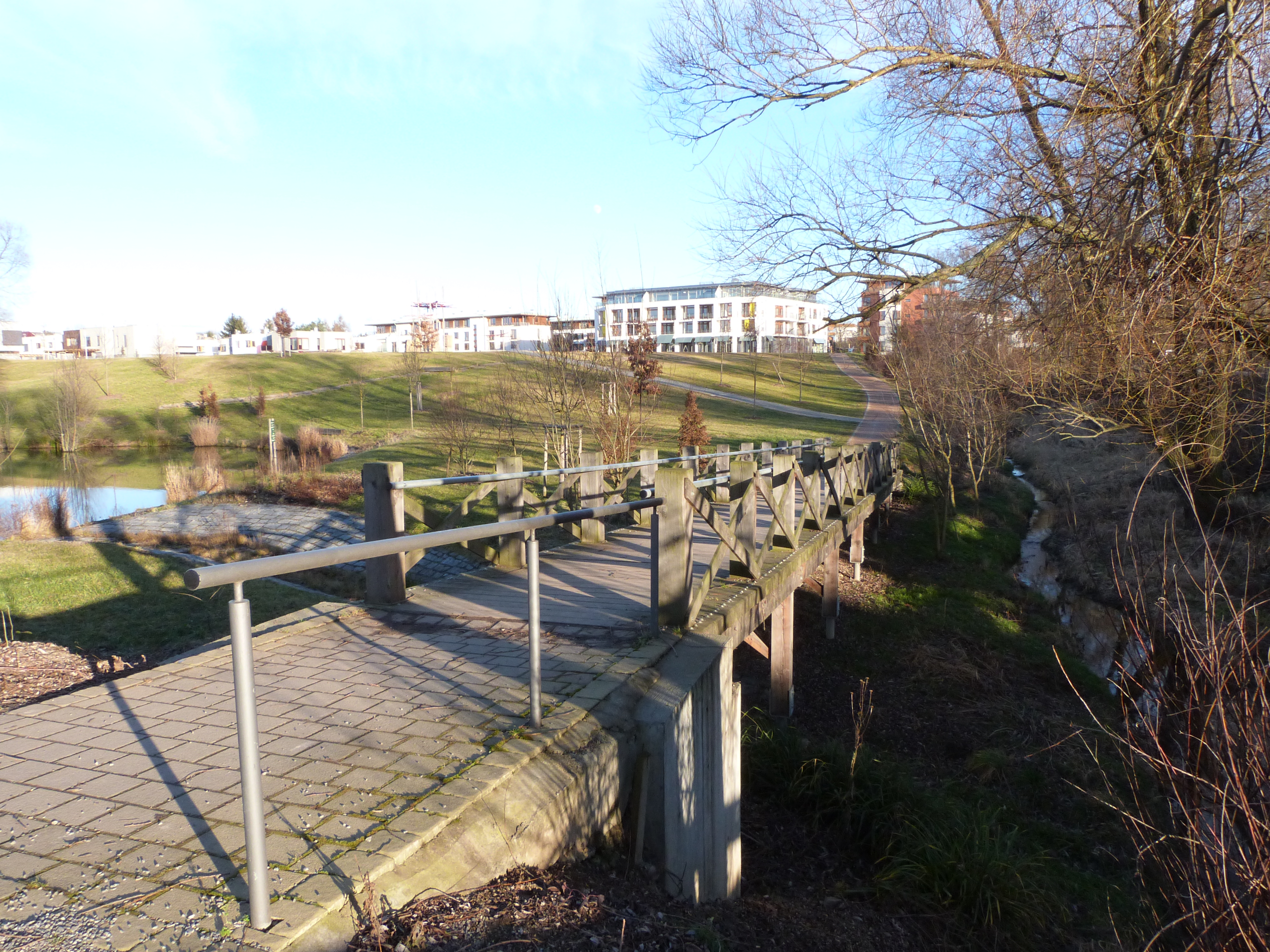 Keltský park v Dolních Břežanech